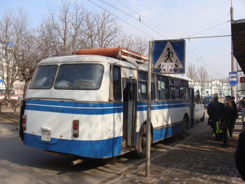 Автобус ЛАЗ-695 в Білій Церкві